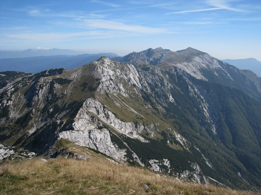 Razgled od Rodice do Črne prsti